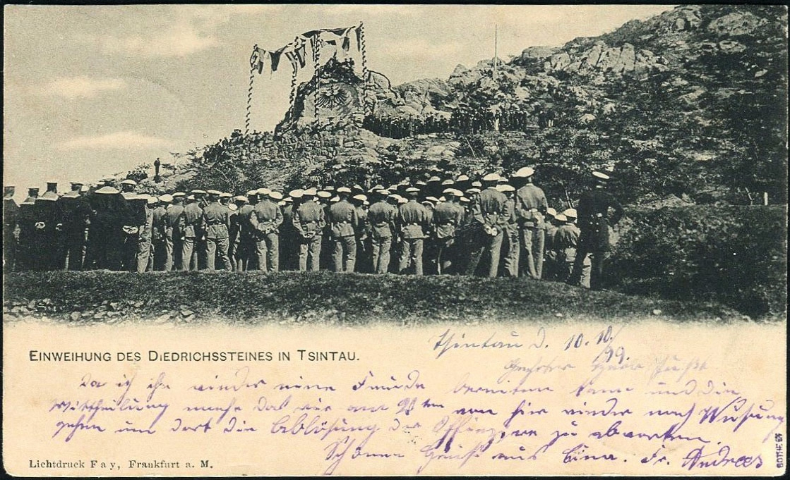 Diederichsstein Tsingtau